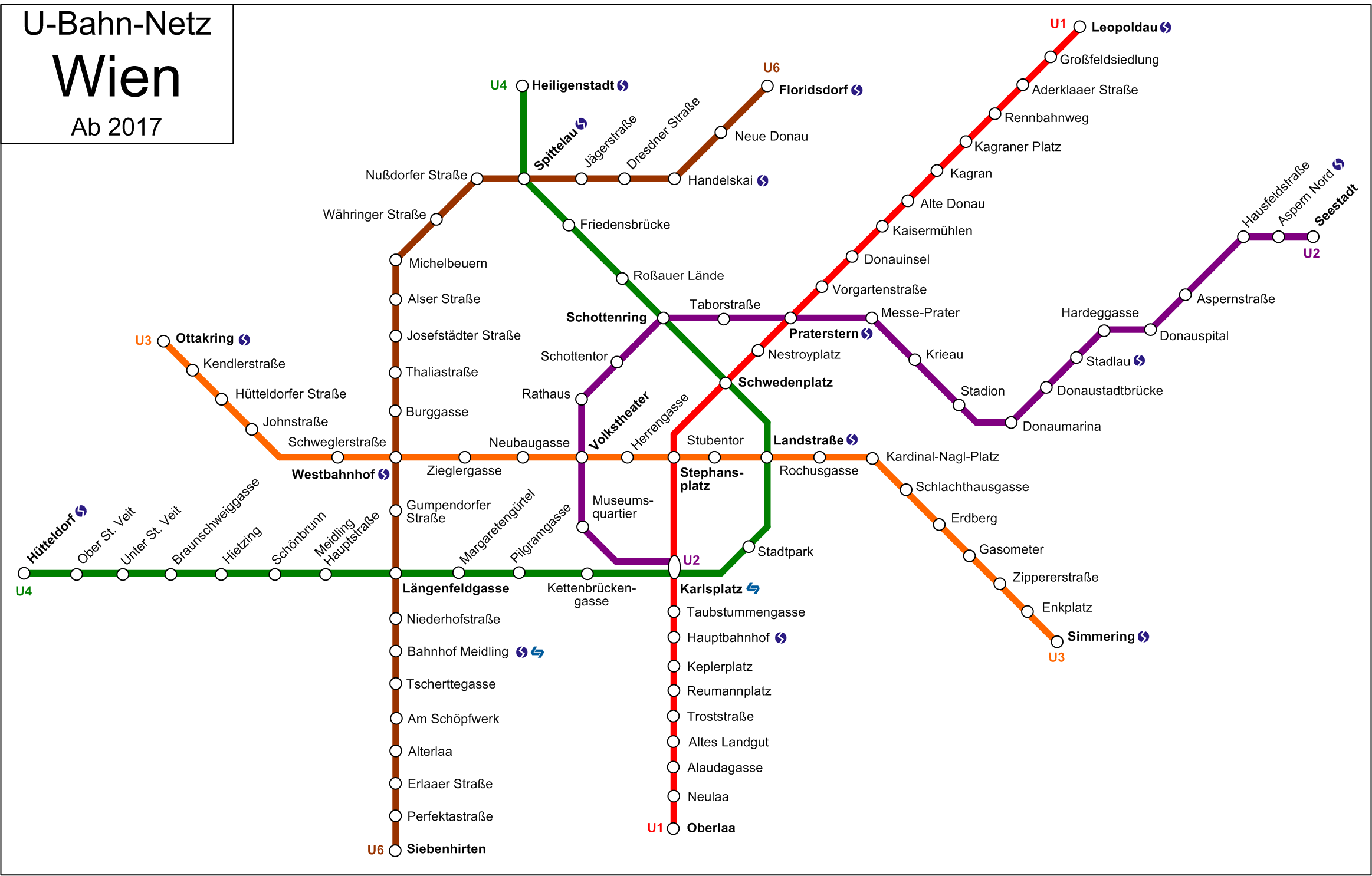 Netzplan Wiener U-Bahn 2017